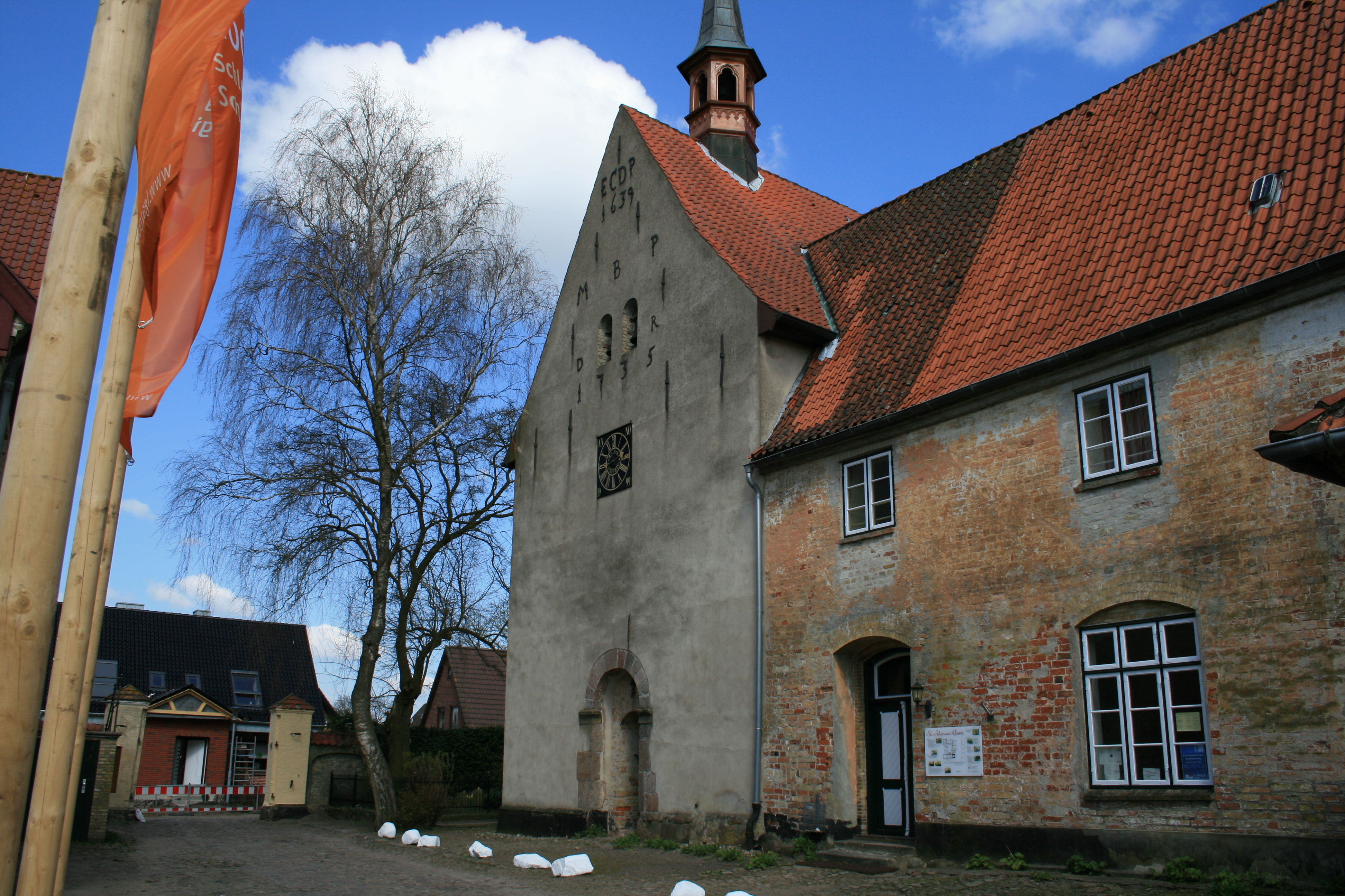 St.Johannis-Kloster